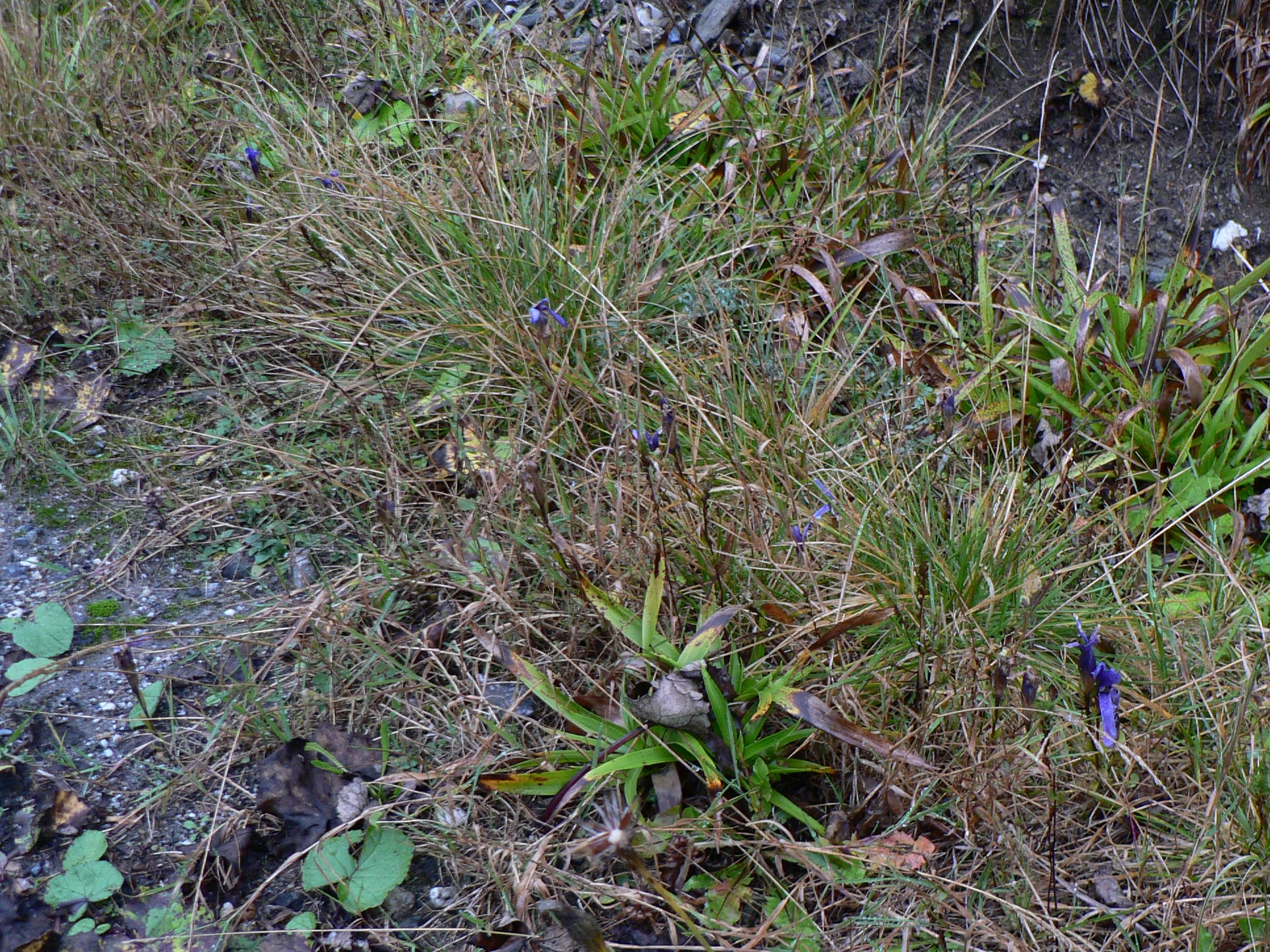 Hořec brvitý (Gentianopsis ciliata), pásmo Orlíku, Hrubý Jeseník (říjen 2007)